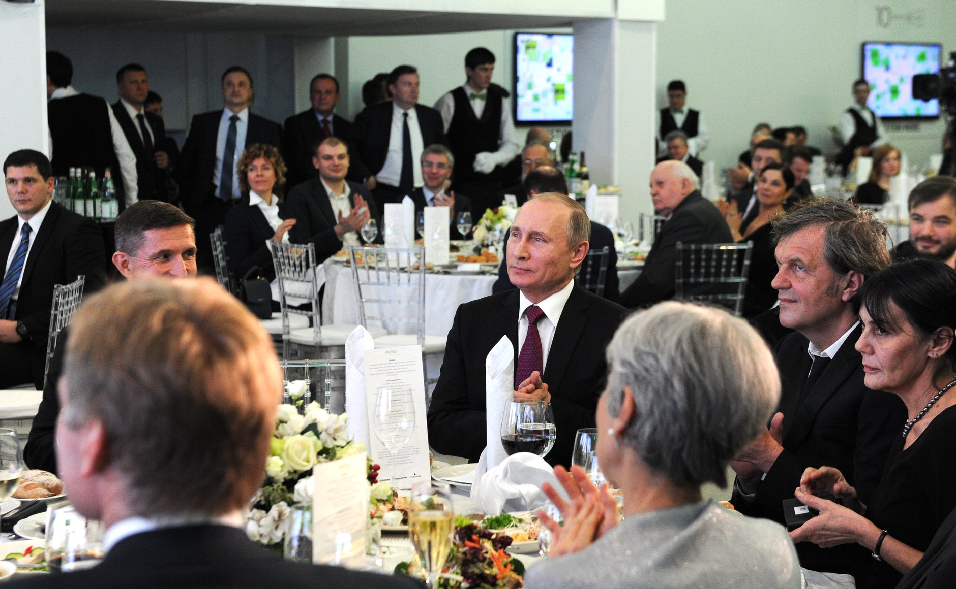 Президент России Владимир Путин на праздновании 10-летия начала вещания телекомпании RTTV – Russia Today